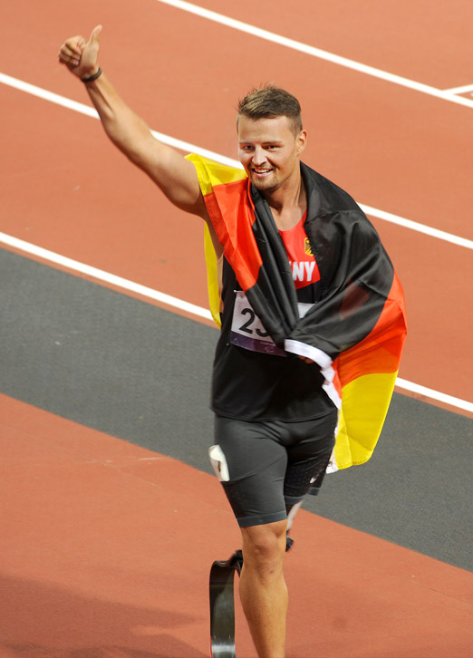 Paralympics 2012: Heinrich Popow nach dem Sieg über 100m